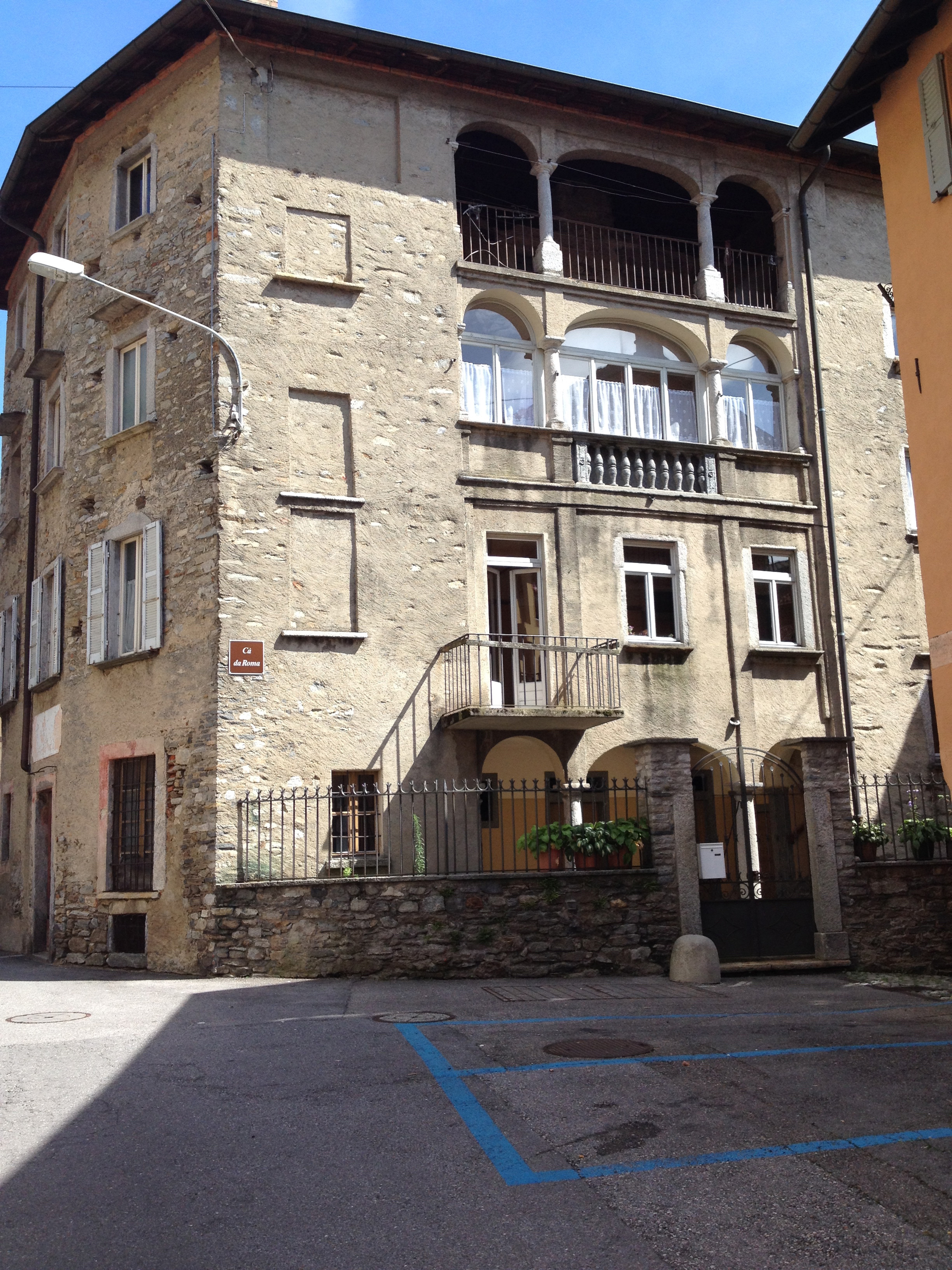 Wohnhaus Ca’ da Roma an der ara Piázza Stehle 7 in Astano TI